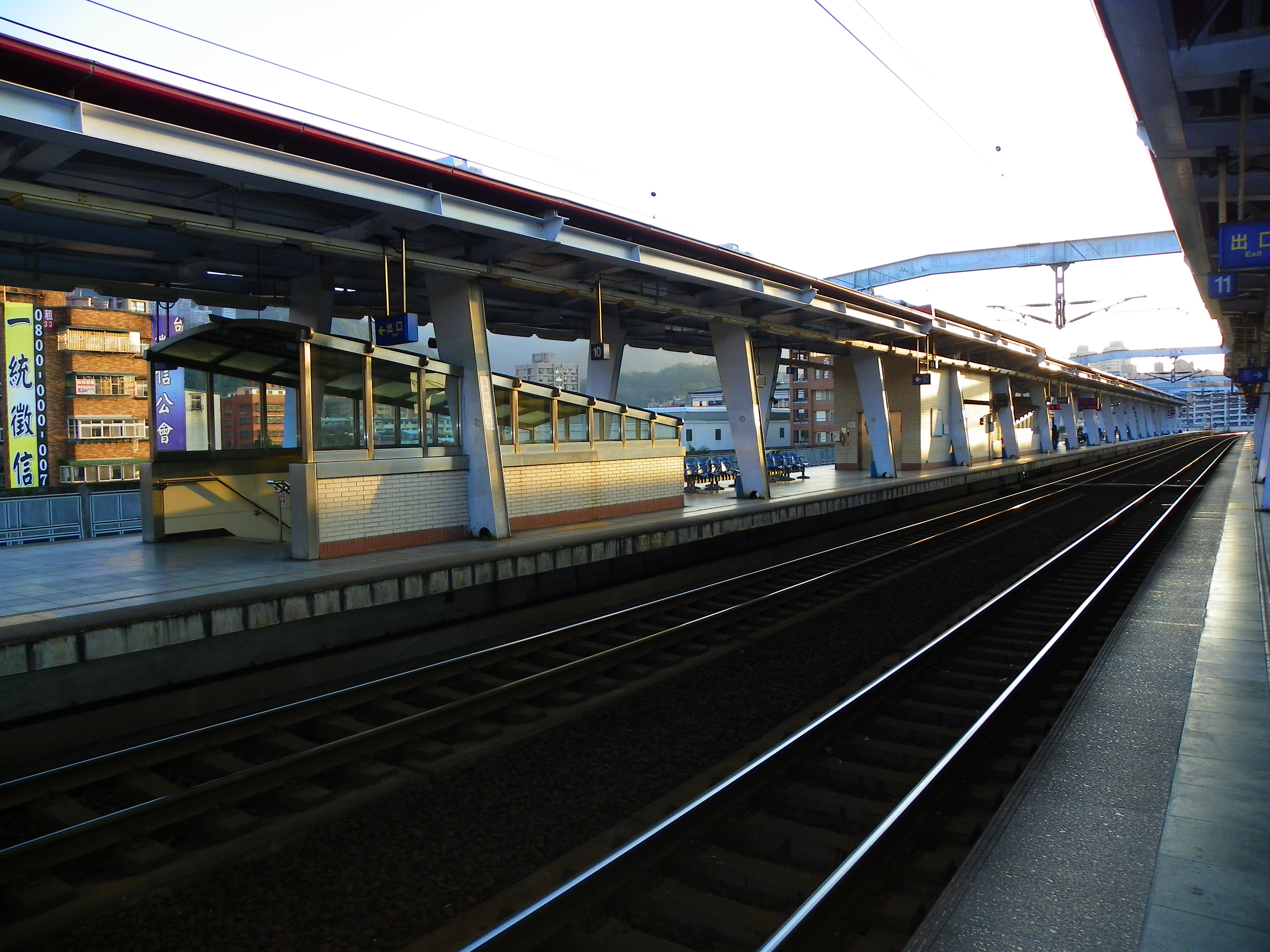 西側から望む台鉄汐止駅の第一ホーム。